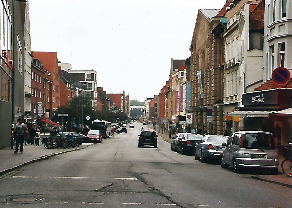 Blick von der Breiten Straße aus in die Beckergrube in Lübeck